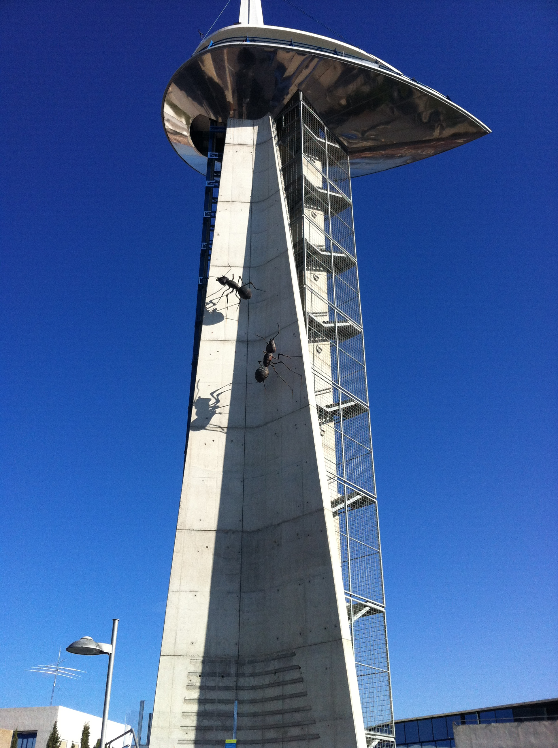 Parque de las Ciencias de Granada